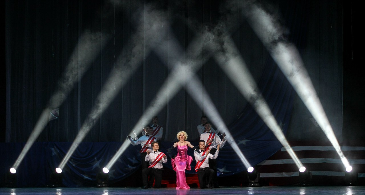 «Мэрилин Монро. Образ затмивший жизнь» Театр мюзикла Комильфо